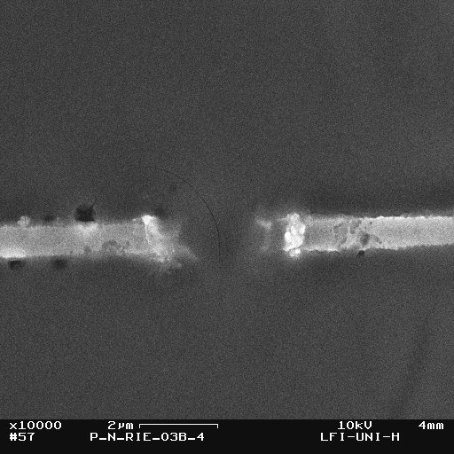 Aufnahme eines Ausfallortes verursacht durch Elektromigration in einer Kupferleiterbahn unter dem Rasterelektronenmikroskop. Die Passivierung wurde vorher durch Reactive Ion Etching (RIE) und Fluorwasserstoffsäure (HF) entfernt. Die Ätzprozesse sind dabei nicht erprobt gewesen und beruhen auf Versuchen das best mögliche Resultat zu erlangen.